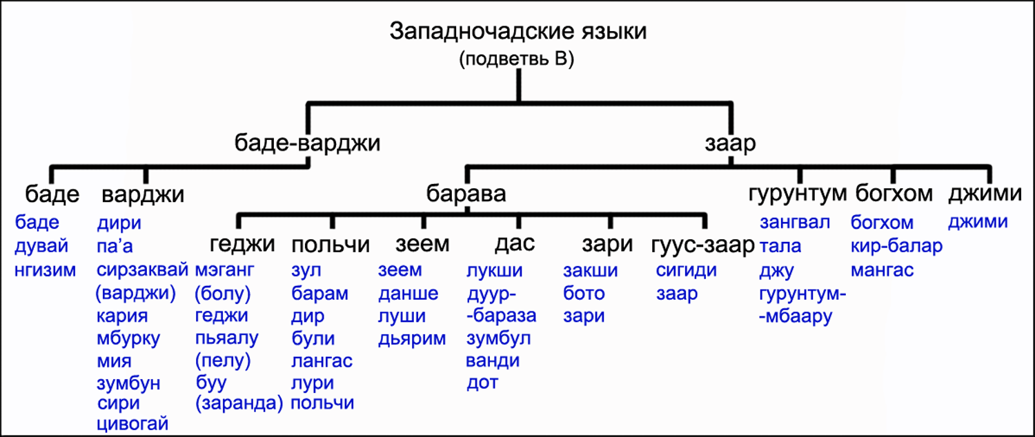 Схема западночадских языков подветви B (баучи-баде), составленная на основе работ Роджера Бленча. Источник: Blench, Roger. An Atlas of Nigerian Languages. 3rd. Edition. Cambridge: Roger Blench Website. Publications 2012. P. 74, 100—102